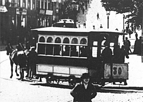 Carro americano no Porto na Praça D.Pedro, hoje Praça da Liberdade